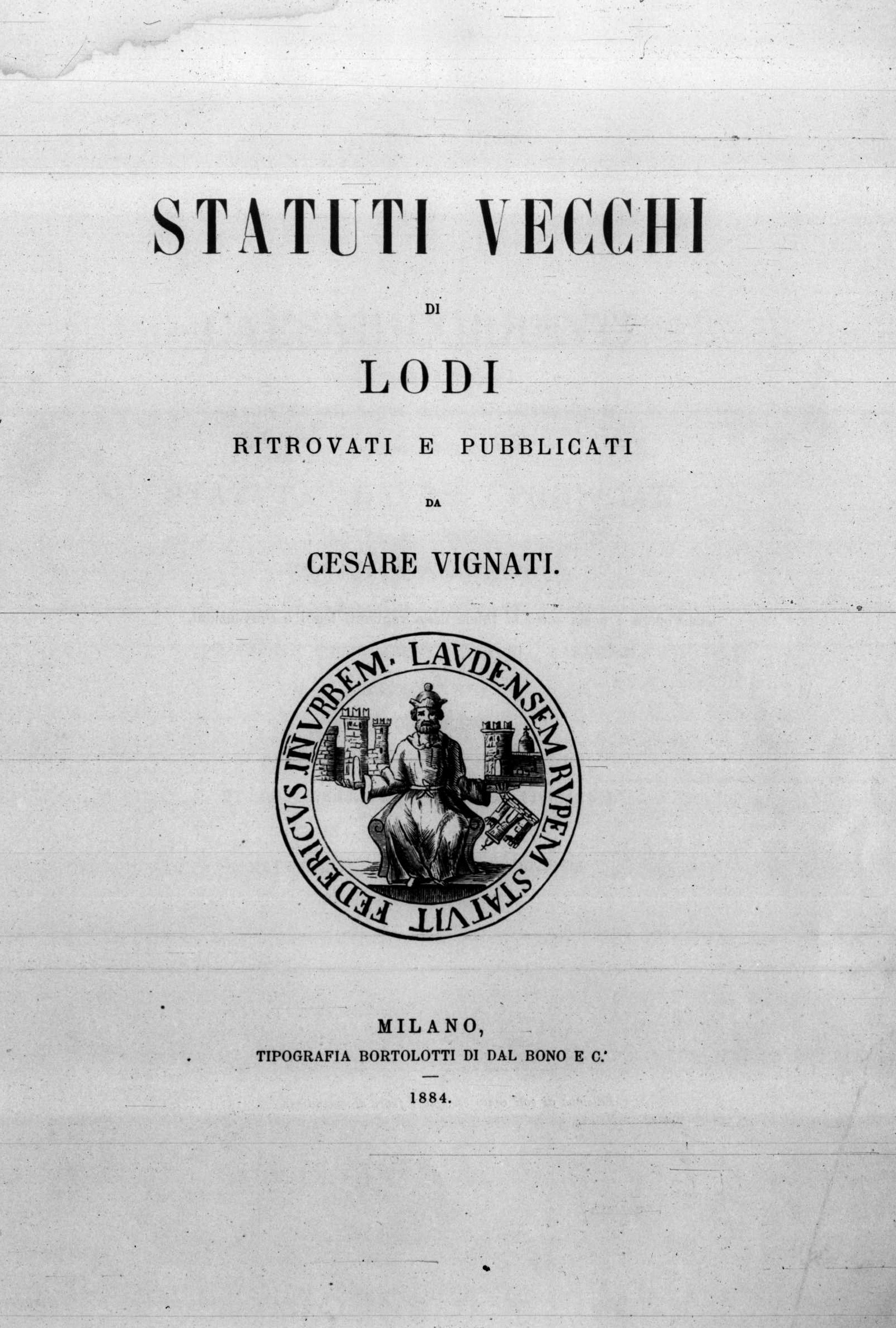 Frontespizio